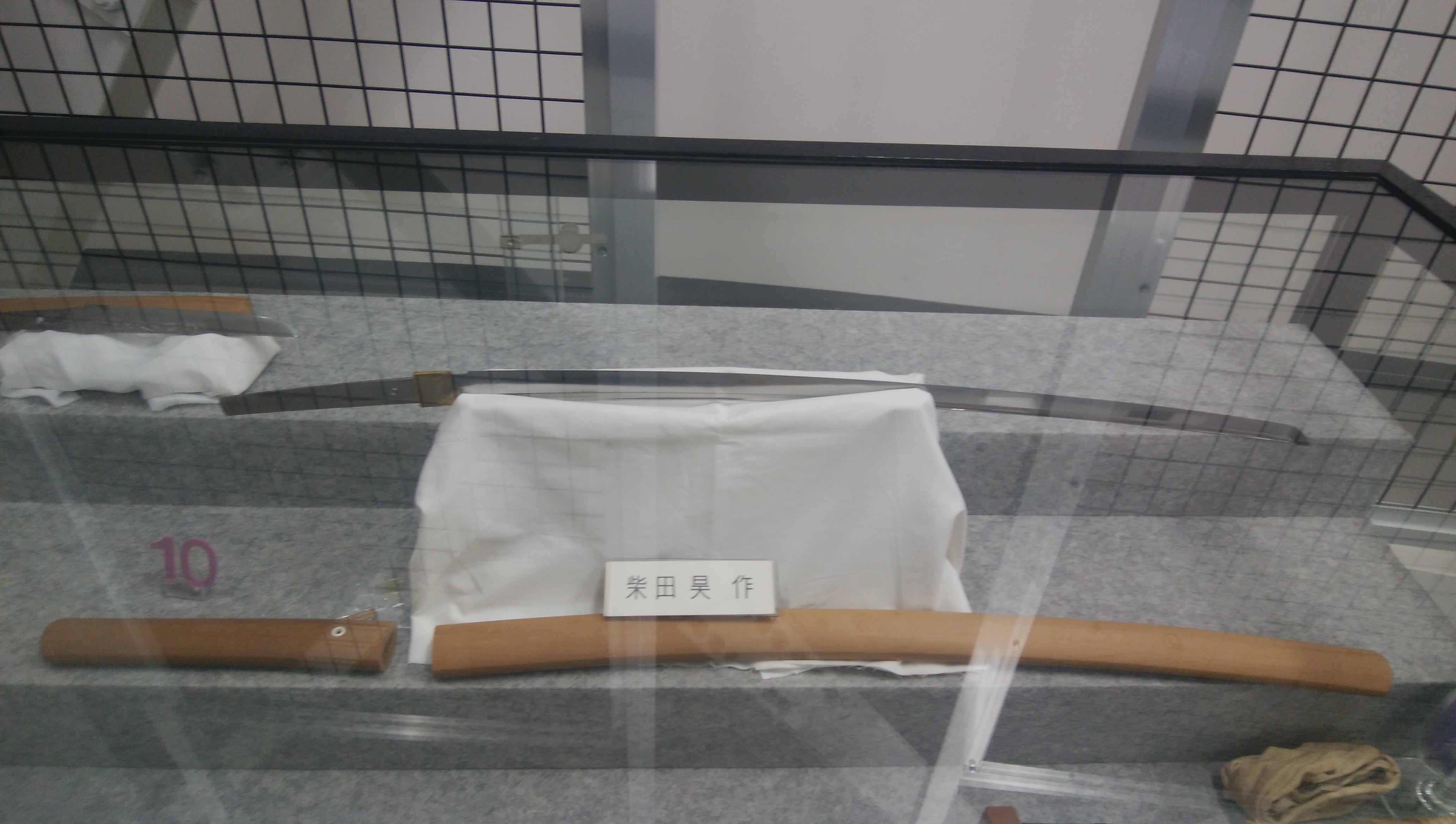 秋田大学鉱業博物館2階に所蔵されている秋田県の刀工柴田昊（本名清太郎）による日本刀。